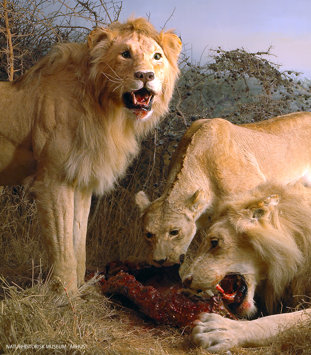 Løvegruppe, Naturhistorisk museum